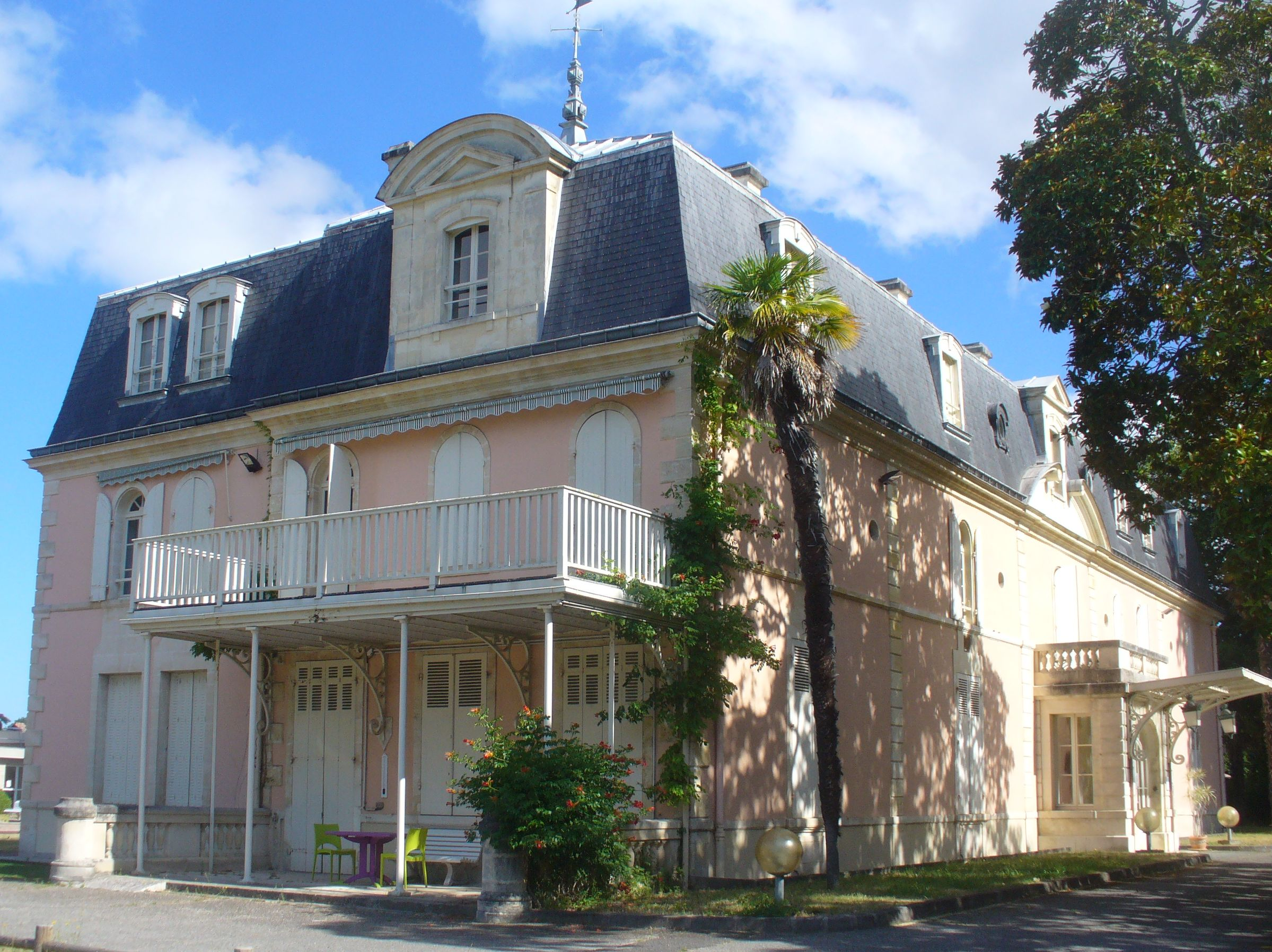 véranda-facade